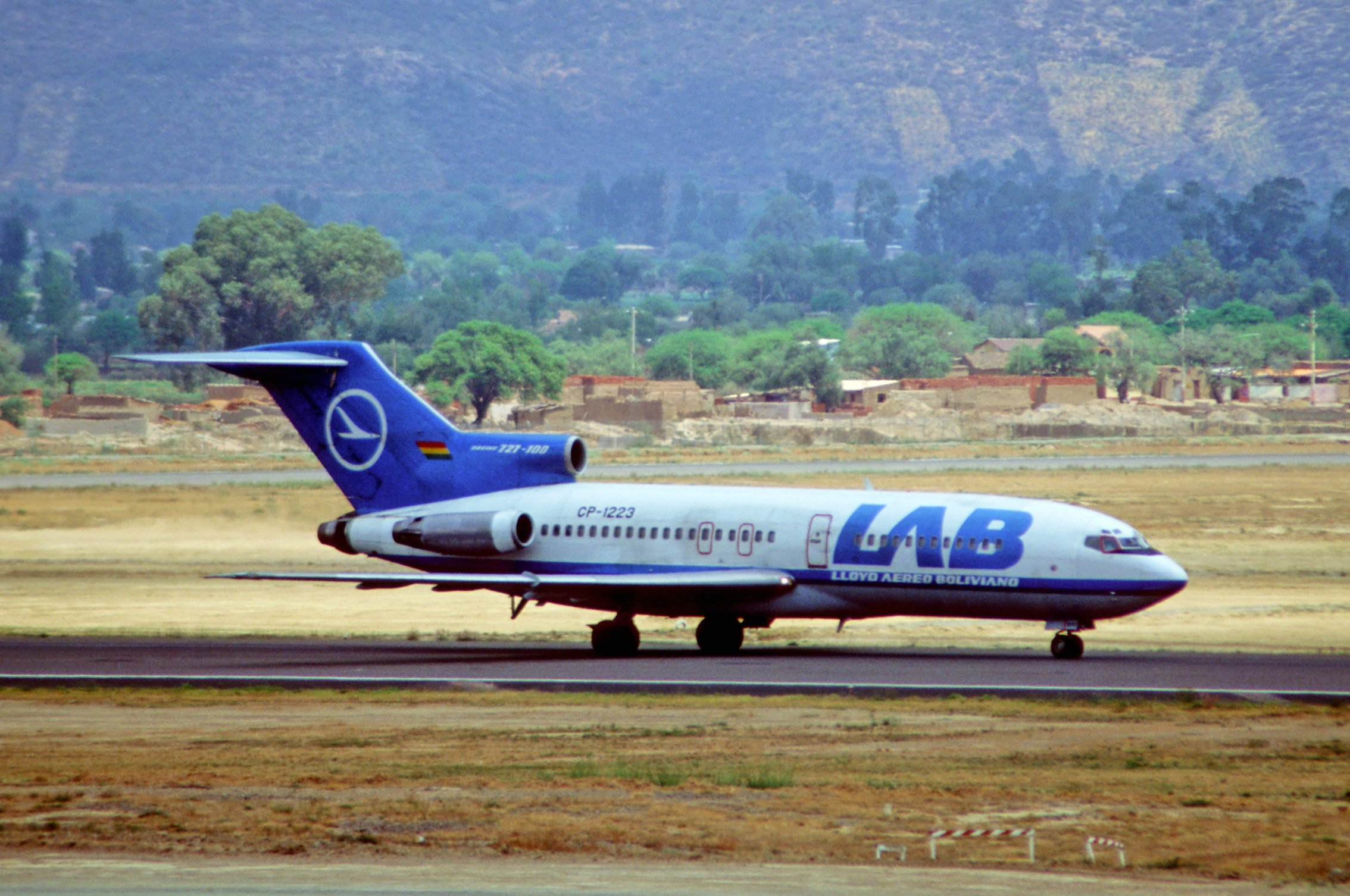 322ag - LAB Boeing 727-100; CP-1223@CBB;25.09.2004